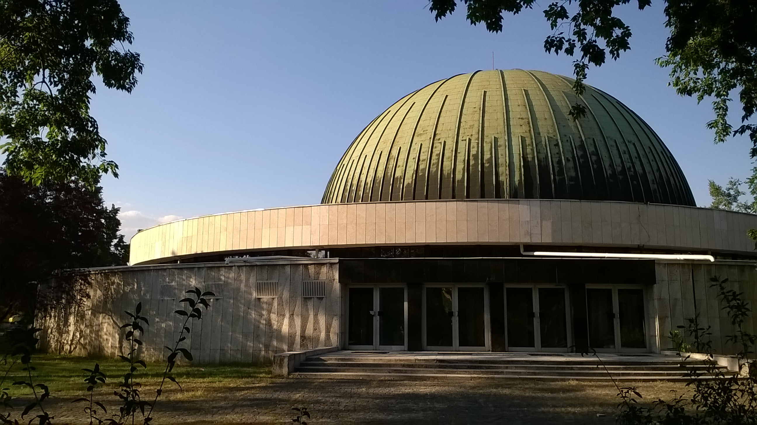 Budapest, Planetárium